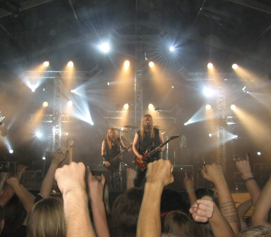 Estonian heavy metal group Metsatöll performing at Tuska Open Air Metal Festival 2006.